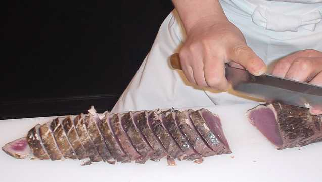 鰹の叩き（2005年5月投稿者が撮影）